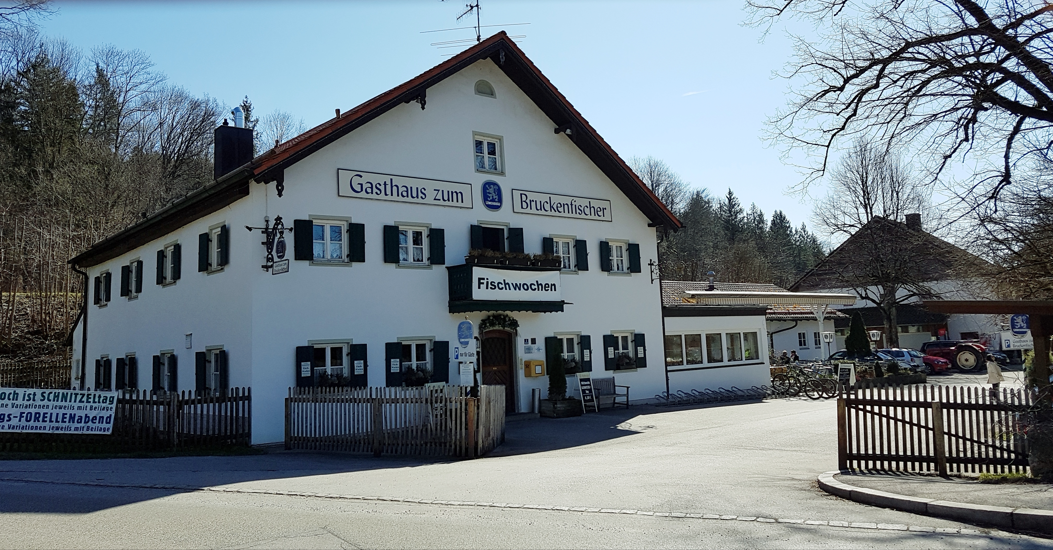 Gasthaus Bruckenfischer (Dürrnstein, Egling)